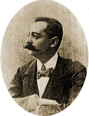 Йосиф Кімаєр